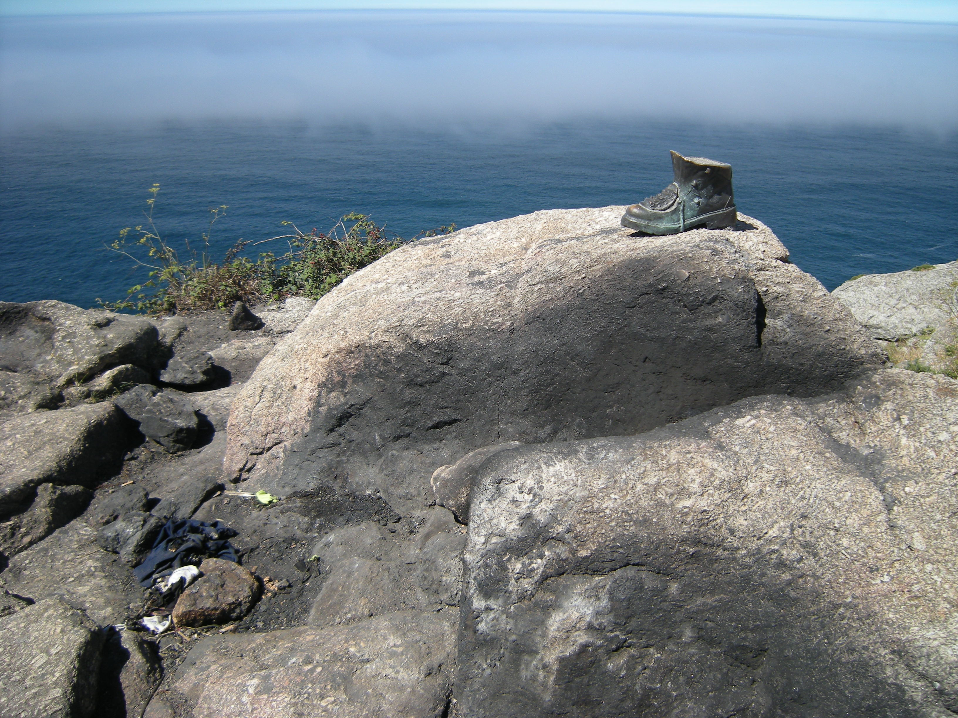 Cabo Fisterra